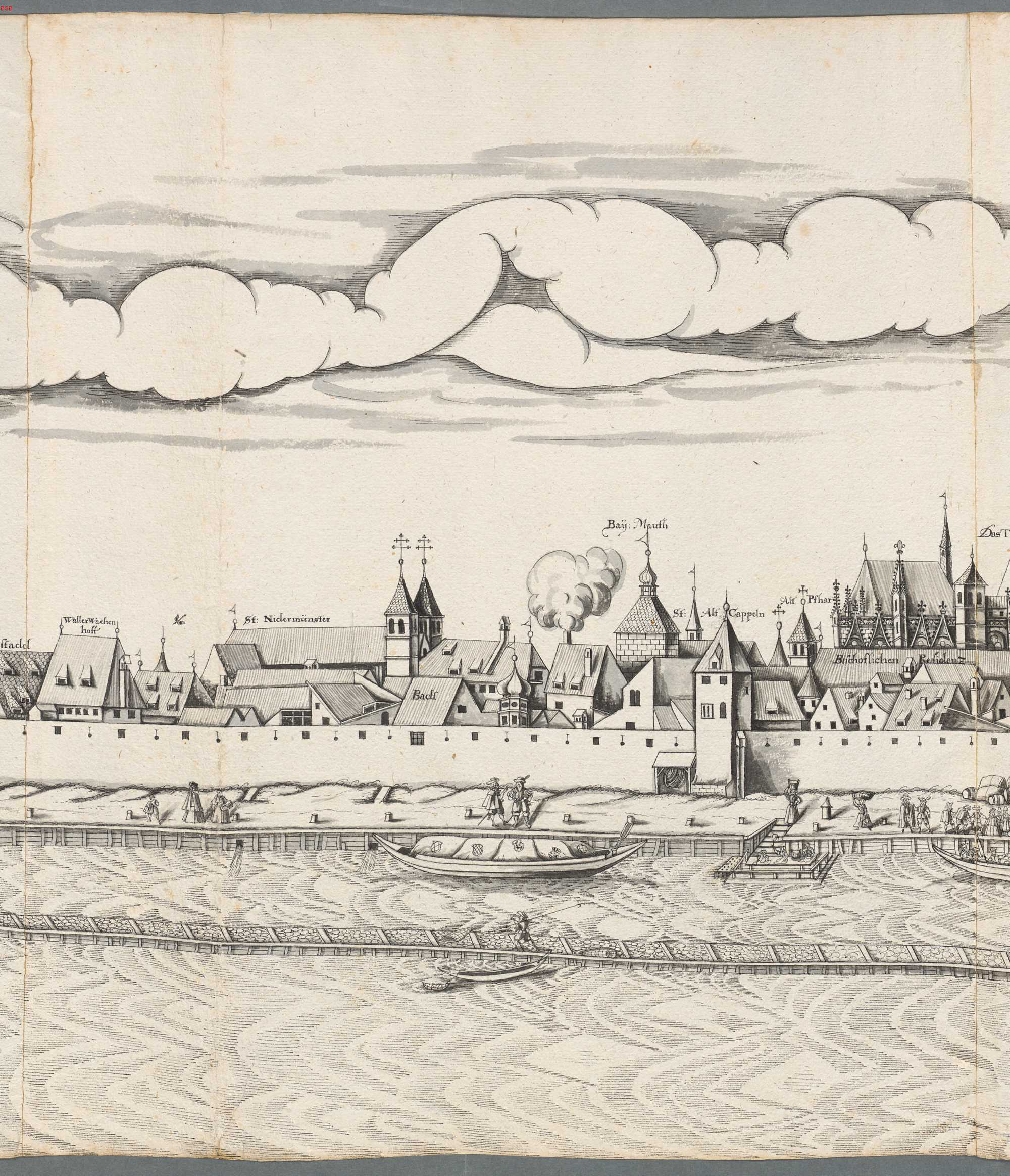 Abriß der Stadt Regensburg östlich und westlich der Steinernen Brücke. Beschriftungen: Waller Wachen Hoff ( ? ), St Nidermünster (Niedermünster), Baclf ( ? ), Baij Mauth (Bayerische Mauth), St Alt Cappeln (Alte Kapelle), Alth Pfhar (Alte Pfarr), Bischofliche Residenz (Bischoffshof) Niedermuenster Dom